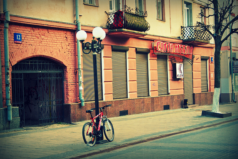 Lesi Ukrainky street